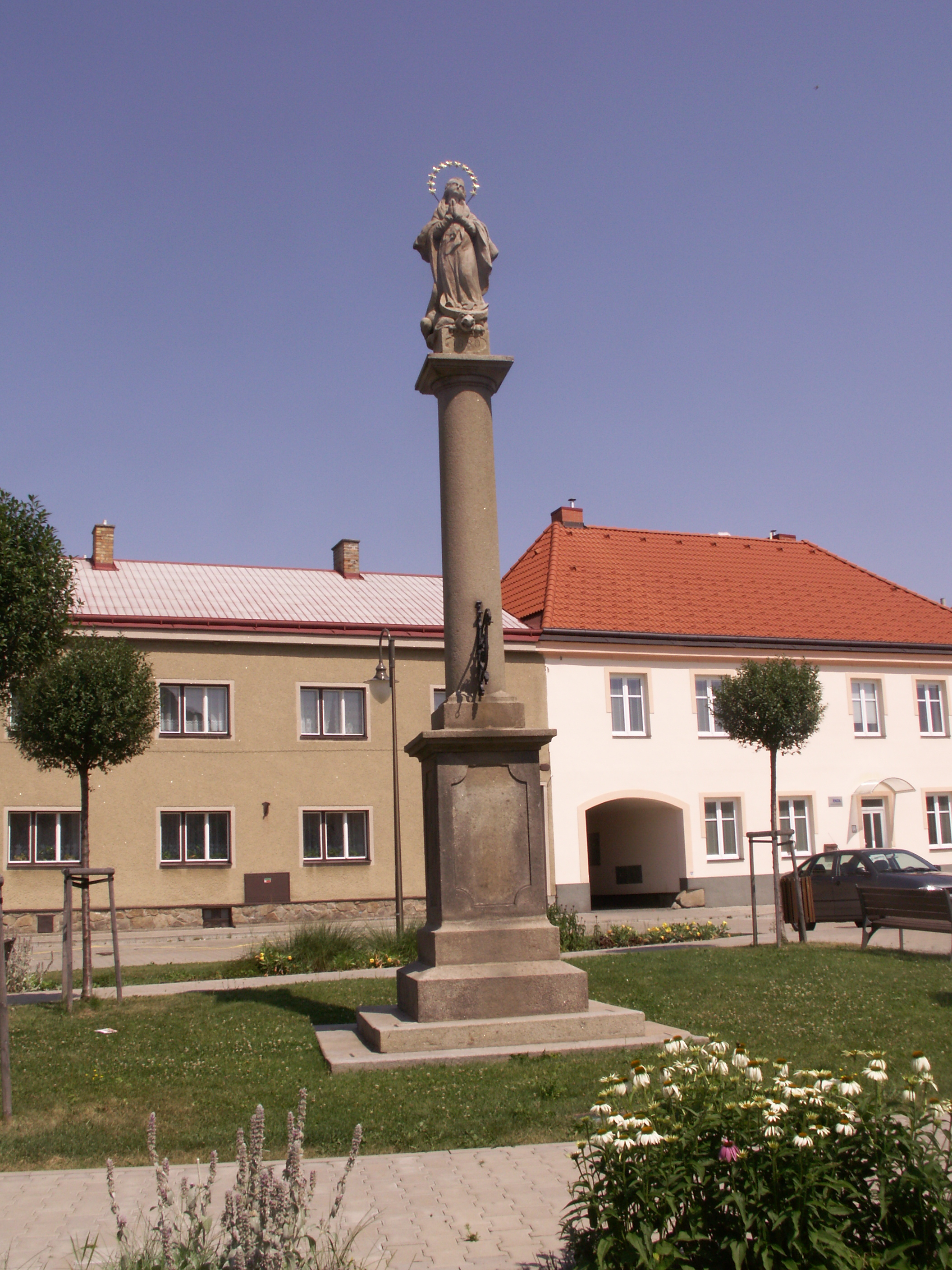 Sloup se sochou P. Marie, nám. T. G. Masaryka, Golčův Jeníkov